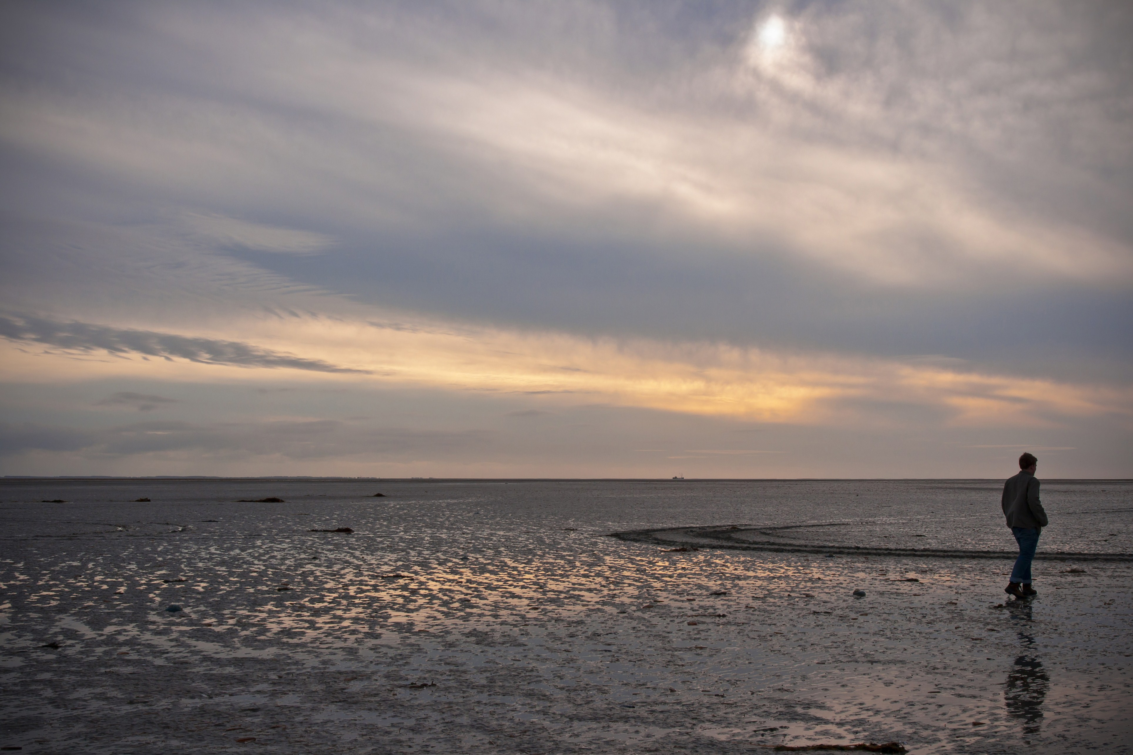 De Balg - Schiermonnikoog - the Netherlands